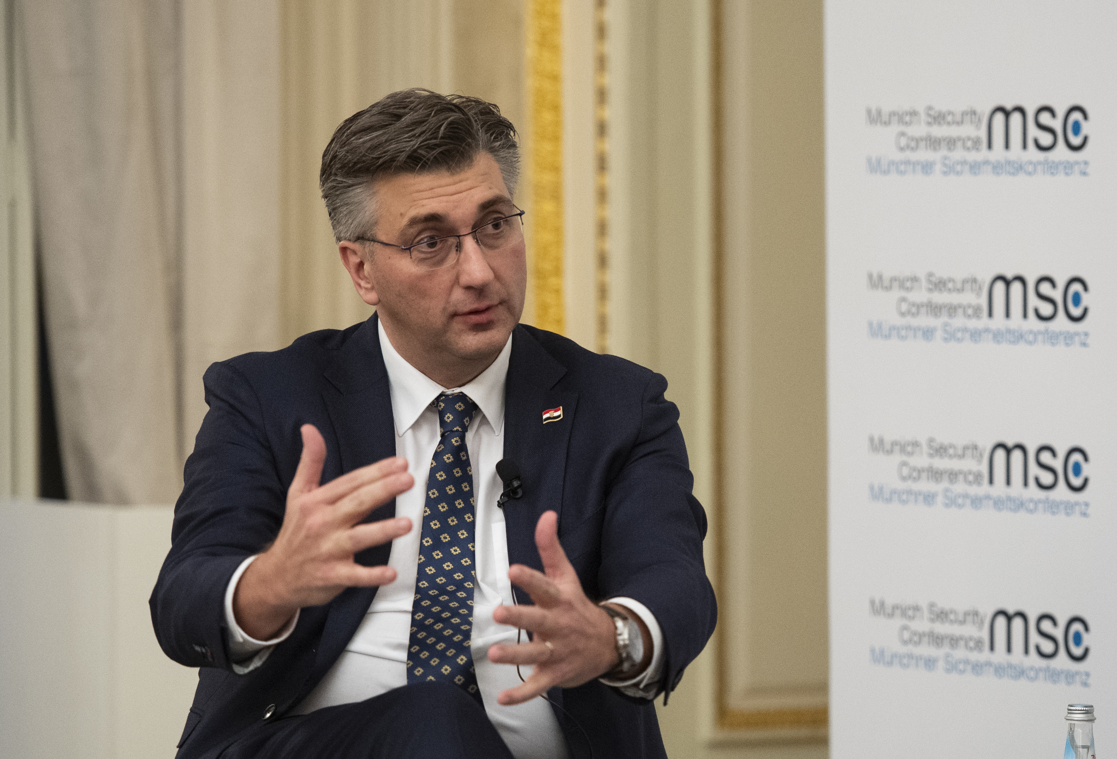 Andrej Plenkovic während der Münchener Sicherheitskonferenz 2019